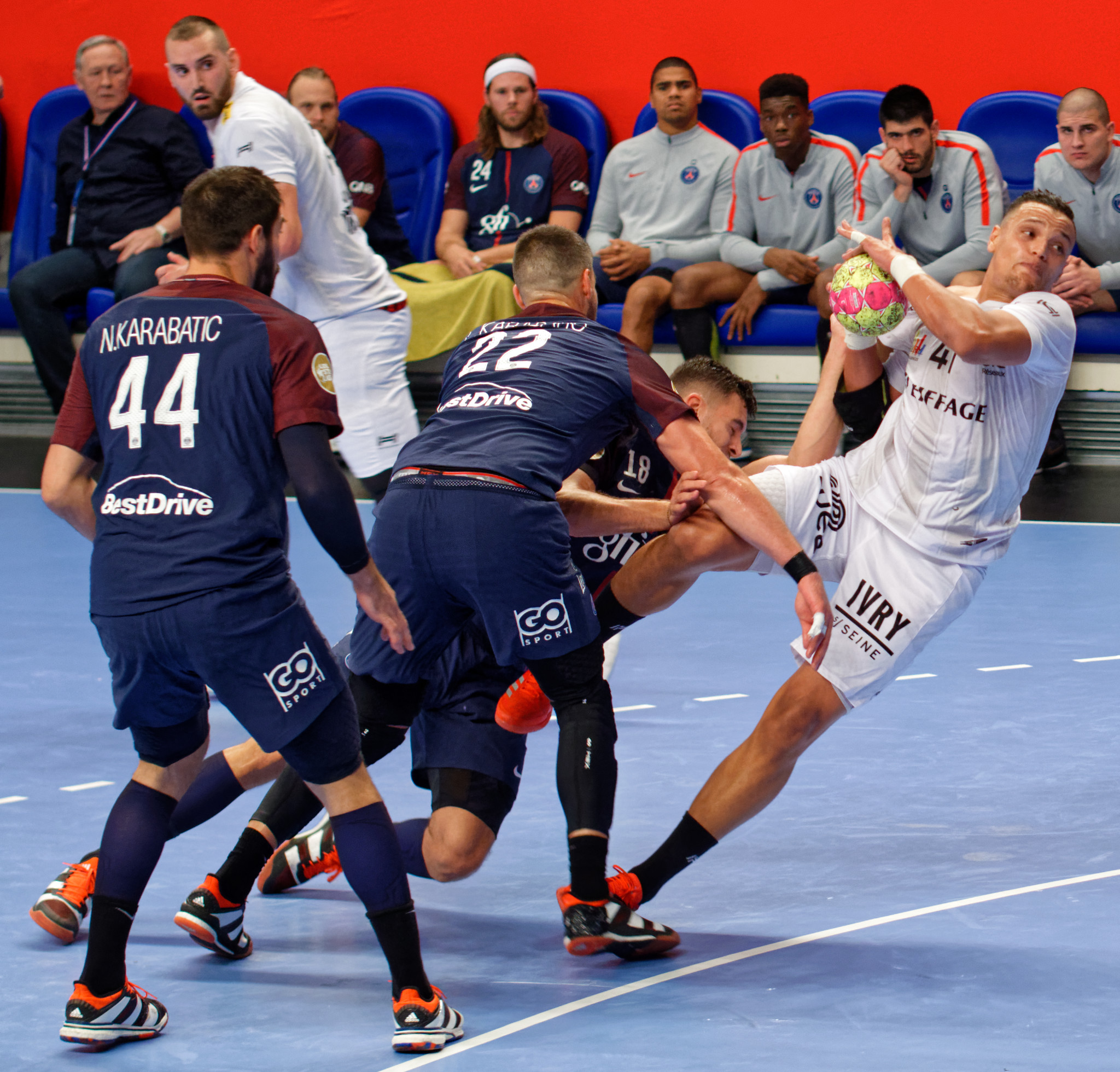 Rencontre de championnat entre le PSG et l'US Ivry A coubertin, le 14 septembre 2017.